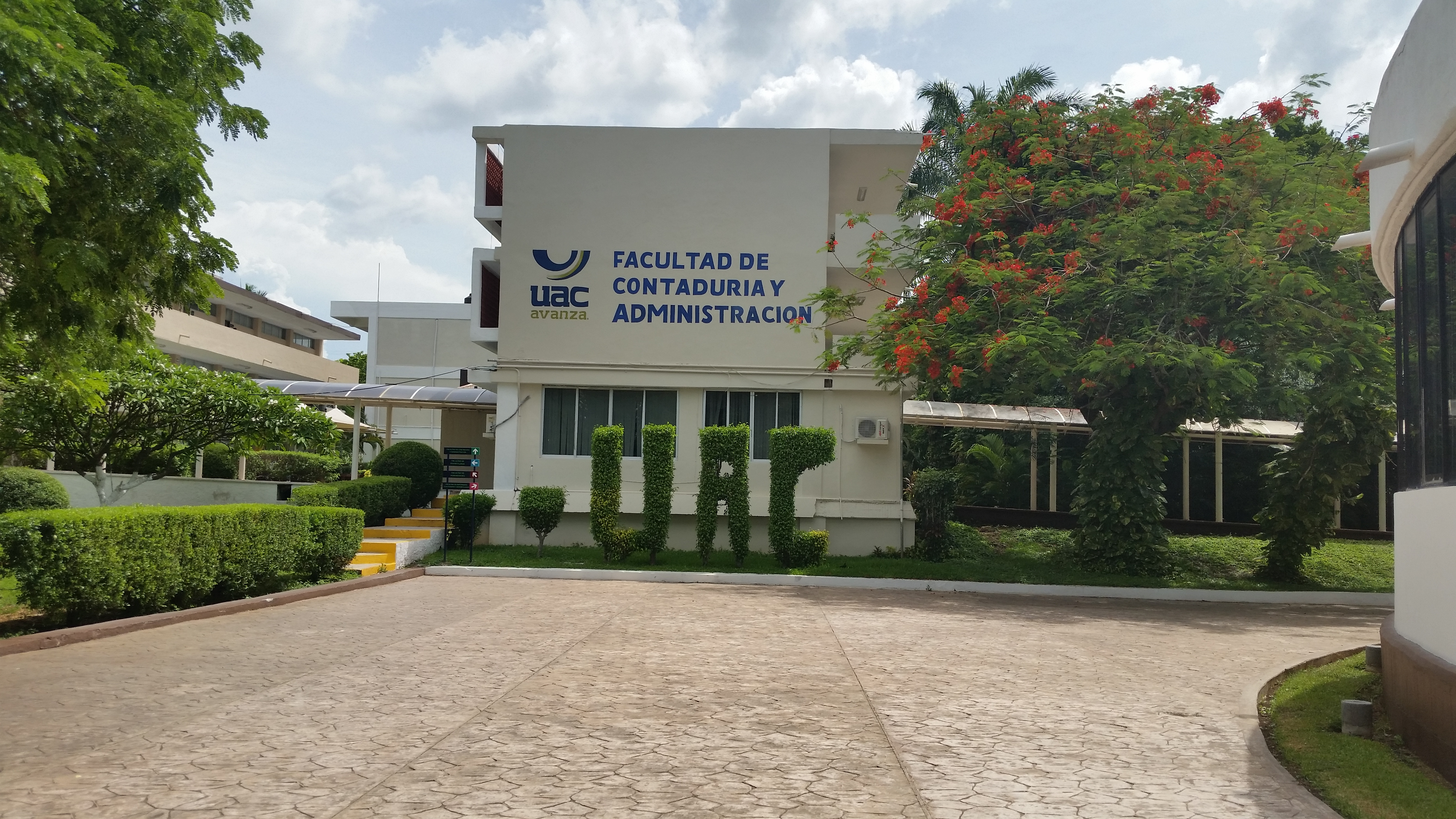 fac de administracion